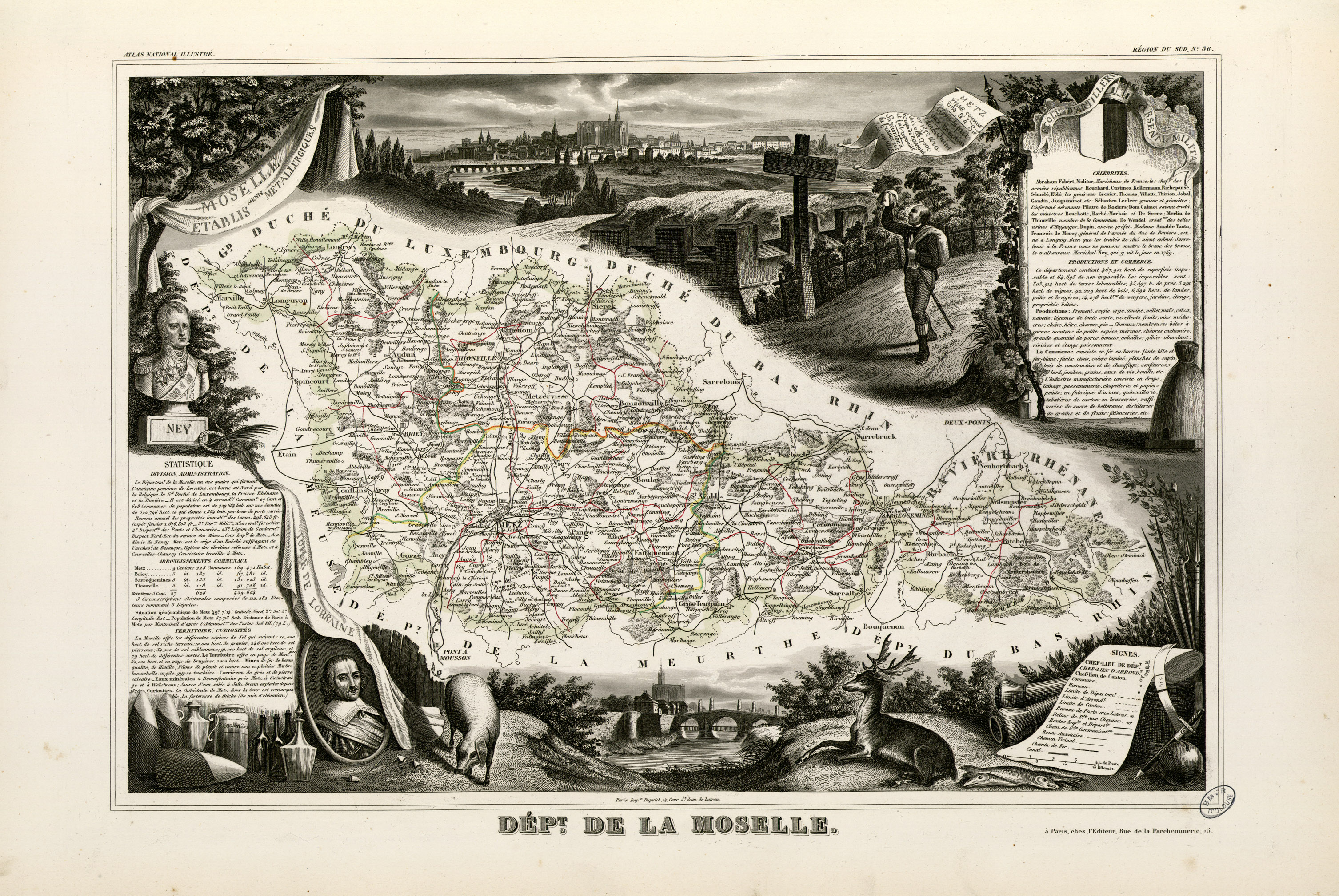 Titre complet du recueil : Atlas national illustré des 86 Départements et des Possessions de la France divisé par Arrondissements, Cantons et Communes avec le tracé de toutes les routes, chemins de fer et canaux. Dressé d'après les Travaux du Cadastre du Dépôt de la Guerre et des Ponts et Chaussées par V. Levasseur, Ingénieur Géographe attaché au Génie du Cadastre et de la Ville de Paris. Gravé sur acier par les meilleurs artistes. Imprimerie de Lemercier à Paris ou imprimerie Dupuich à Paris. Page de titre et 100 pl. en n. et b. et en coul. dont un tableau statistique et 2 cartes dépliantes. Ancely, René (1876 - 1966). Possesseur